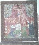 Ehemaliges barockes Altarretabel. Dorfkirche Grüssow, Landkreis Mecklenburgische Seenplatte